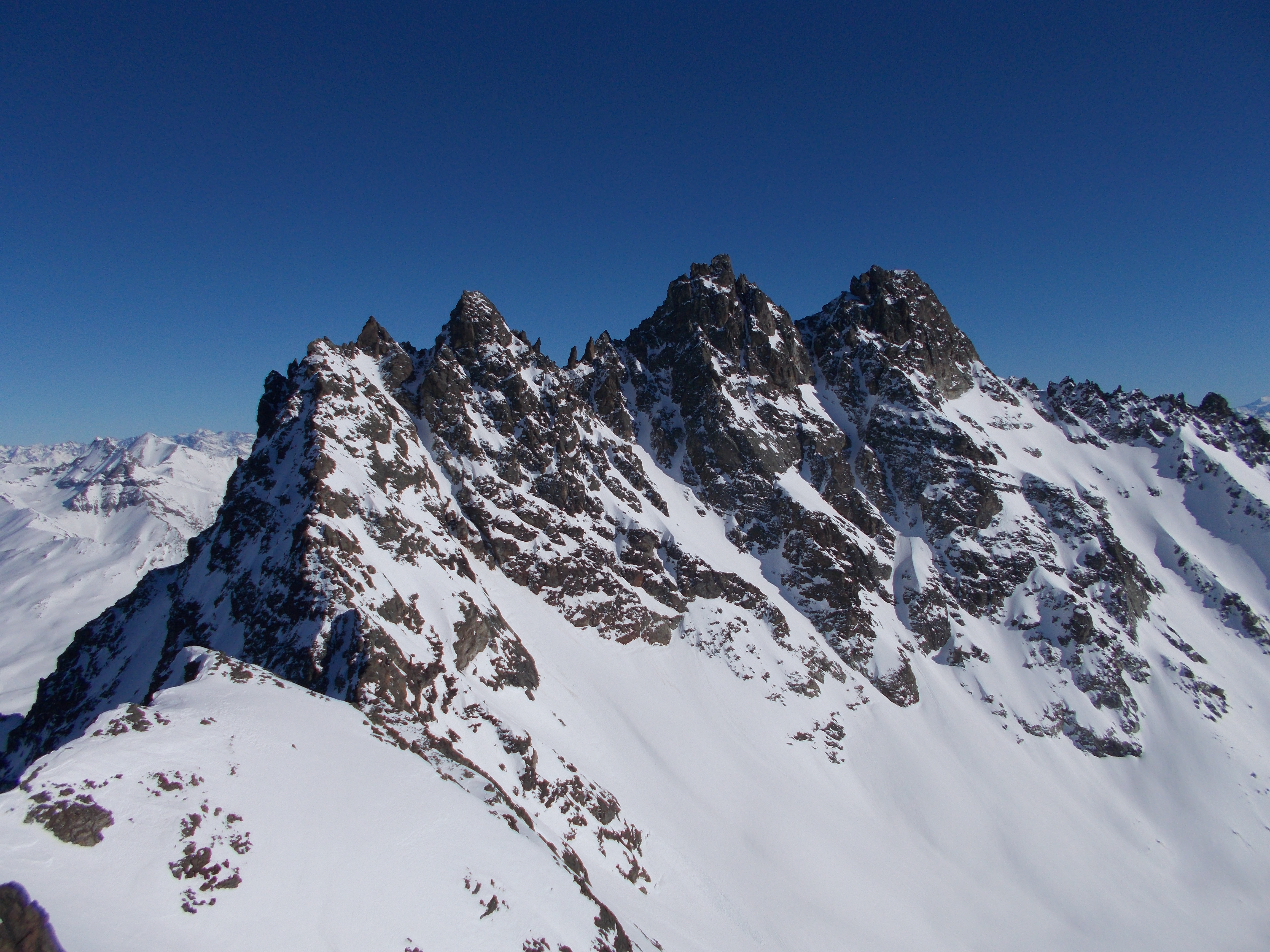 Das Fluchthorn im Winter aus Westnordwest, von der Schnapfenspitze (3219 m) aus gesehen. LInks im Hintergrund ist die Weißkugel, am rechtem Bildrand erkennt man in der Ferne das Ortlermassiv. LInks die Abstürze des Fluchthorns ins Lareintal.